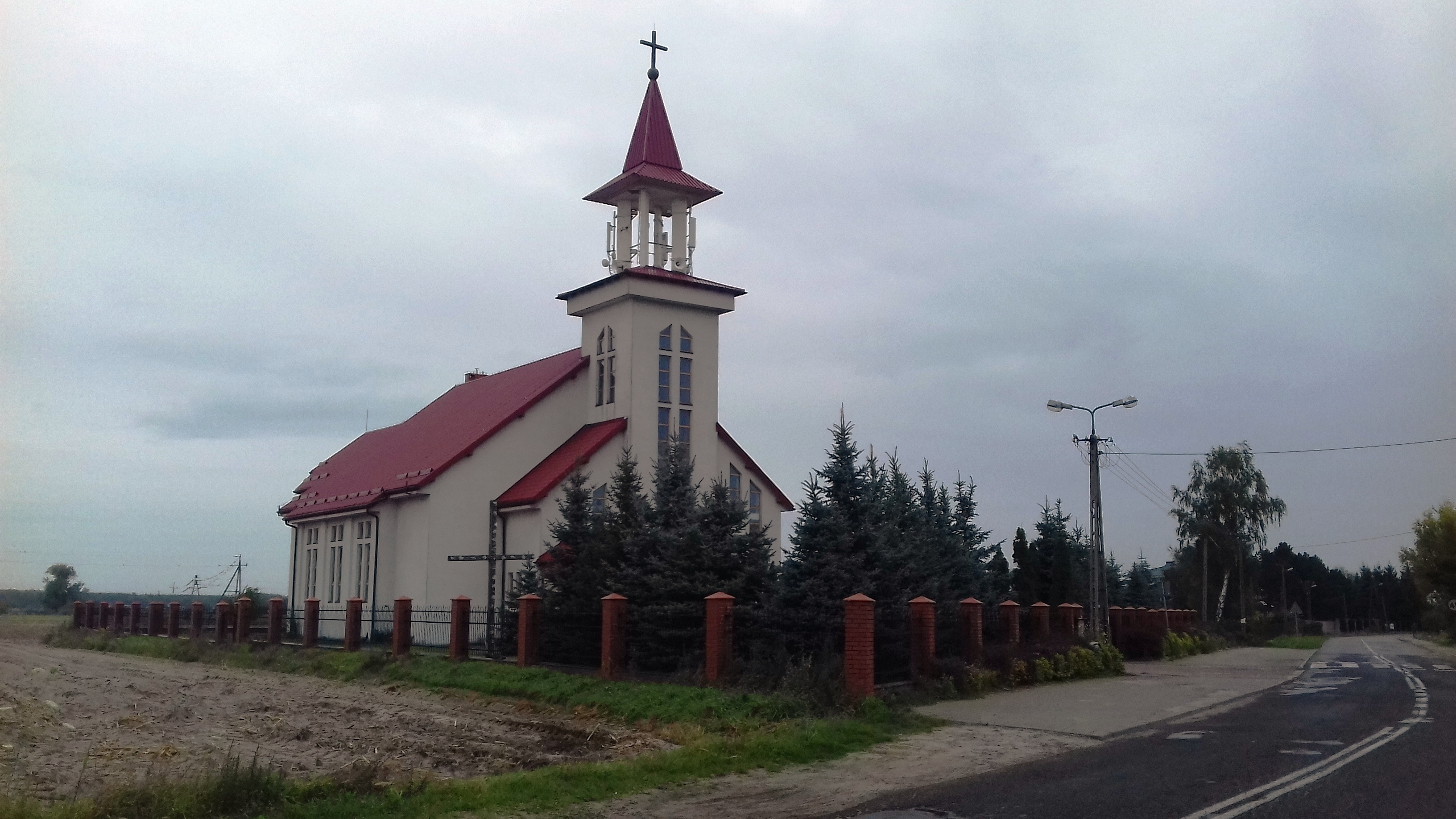 Wólka Kosowska (gm. Lesznowola, pow. Piaseczno) - kościół p.w. św. Franciszka i Hiacynty.